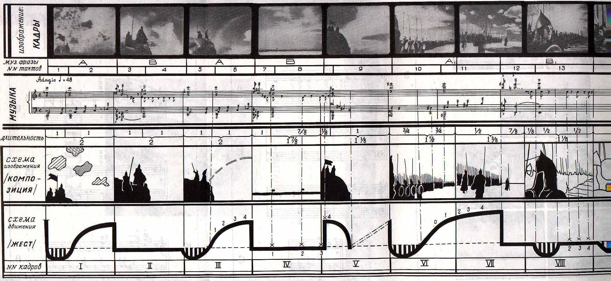 Первая часть схемы (1-8) из сцены перед битвой в фильме "Александр Невский" 1938 г.